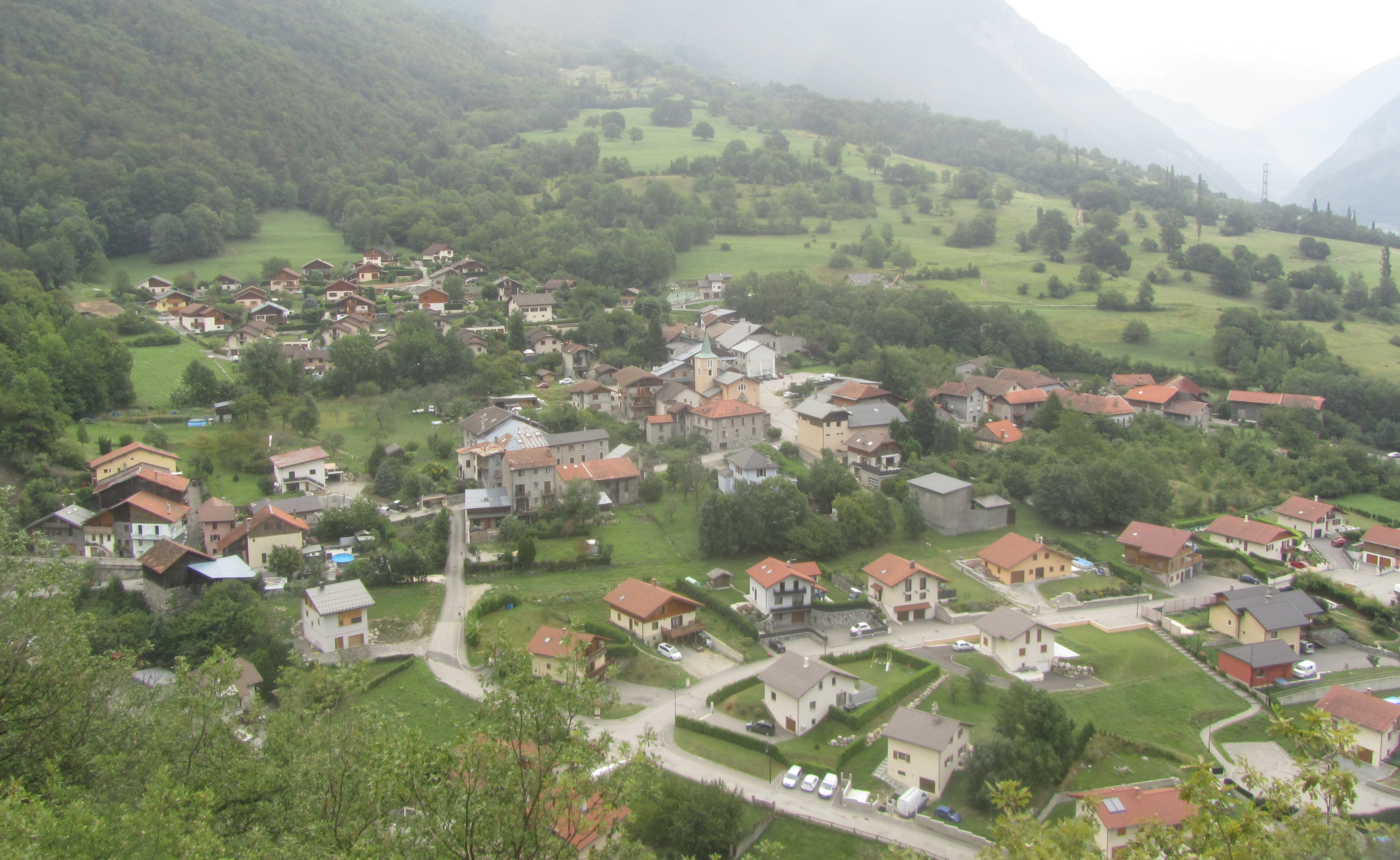 village de Petit-Coeur